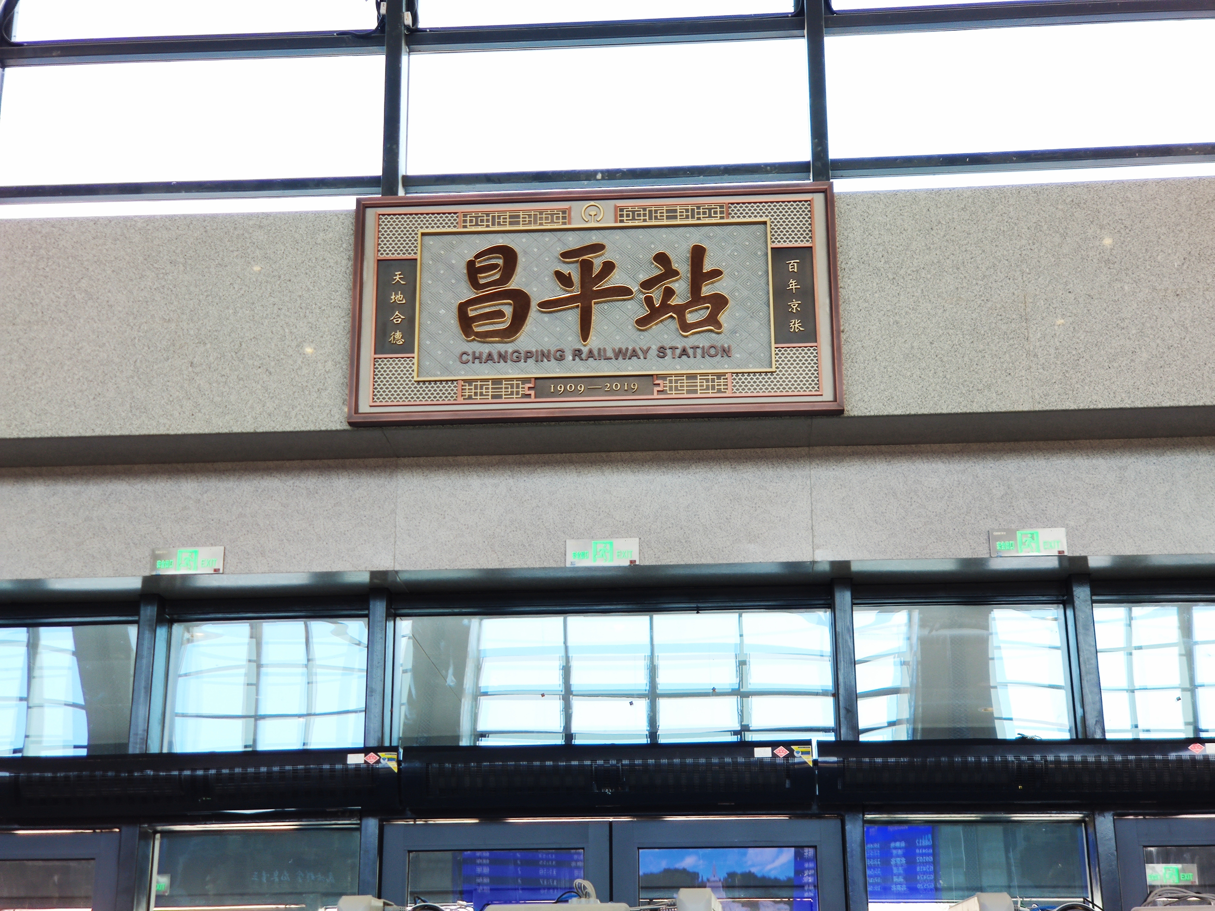 昌平站重建后的站名牌